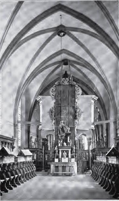 Die Nonnenempore des Klosters Oelinghausen im Zustand von 1906. Es fehlt im Vergleich zu heute etwa noch die im Gewölbe hängende barocke Doppelmadonna